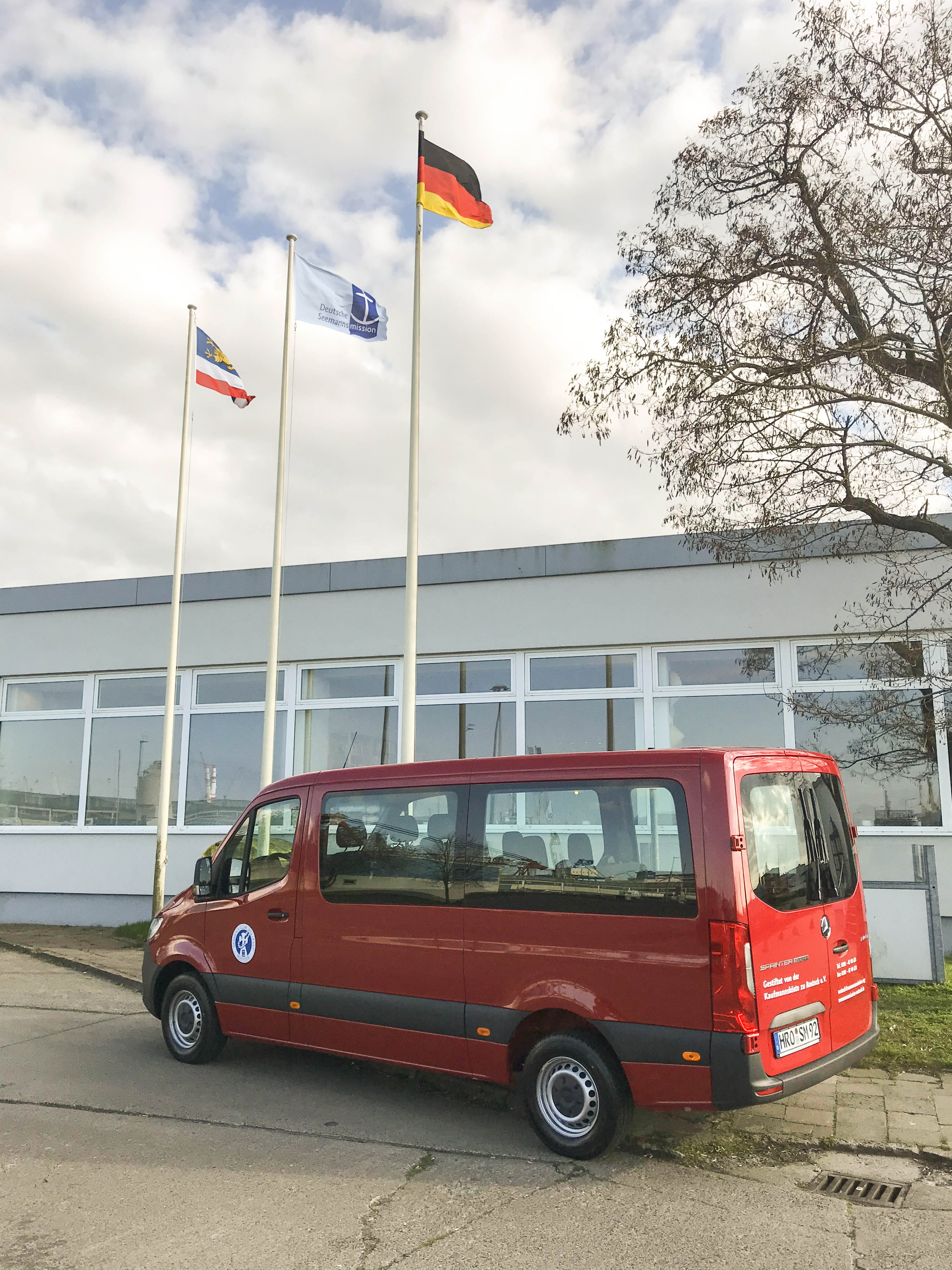 Seemannsmission